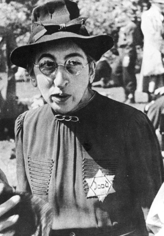 Niederlande, Frau mit Judenstern ADN-ZB II. Weltkrieg 1939-45 Nach der Polizeiverordnung über die Kennzeichnung der Juden in Deutschland vom 1. September 1941 mussten auch die Juden in Holland nach der Besetzung durch die deutschen Faschisten das Kennzeichen tragen. Zentralbild [Judenverfolgung.- Razzia in Amsterdam am 20. Juni 1943.]